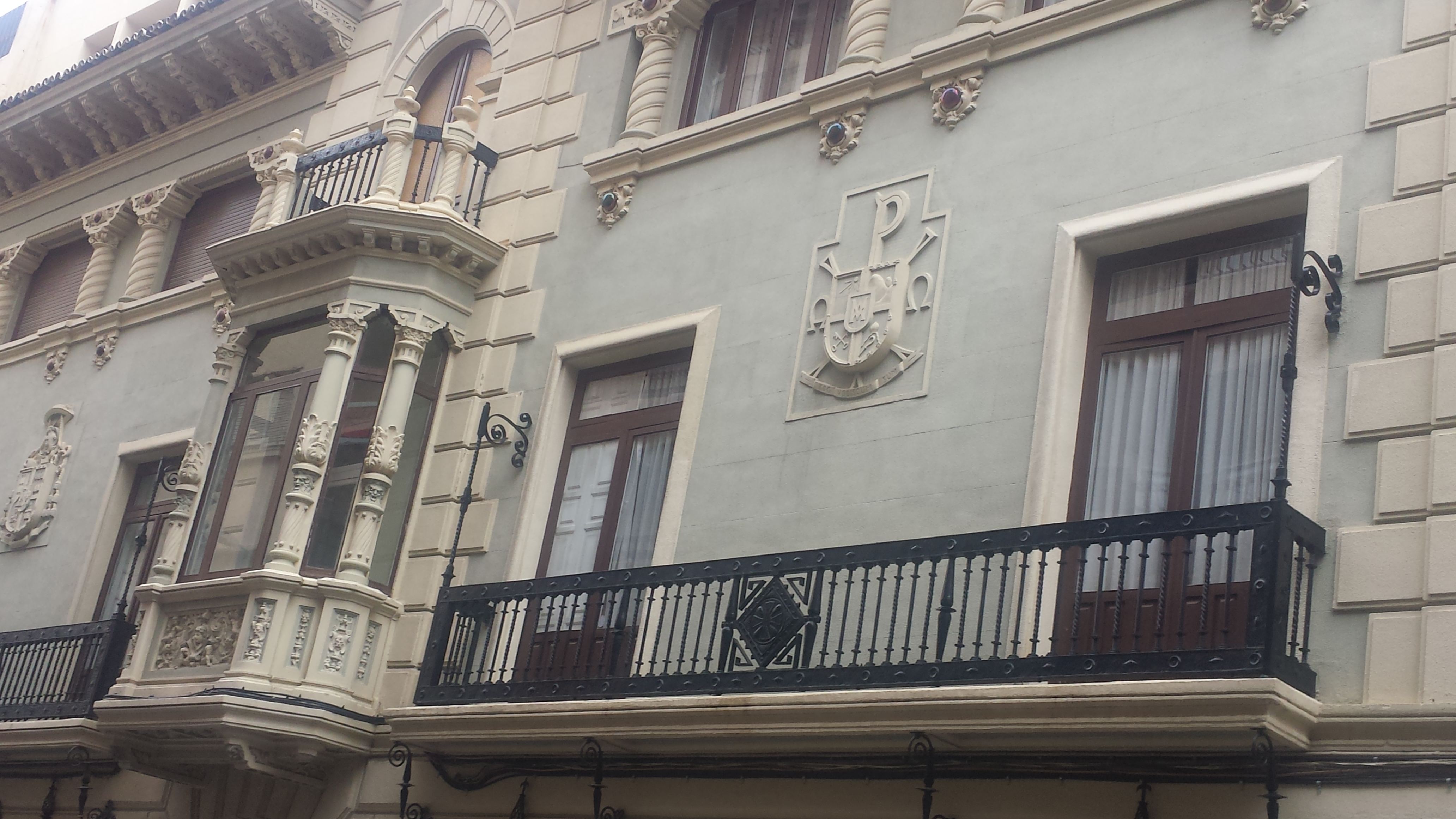 Obispado de Albacete